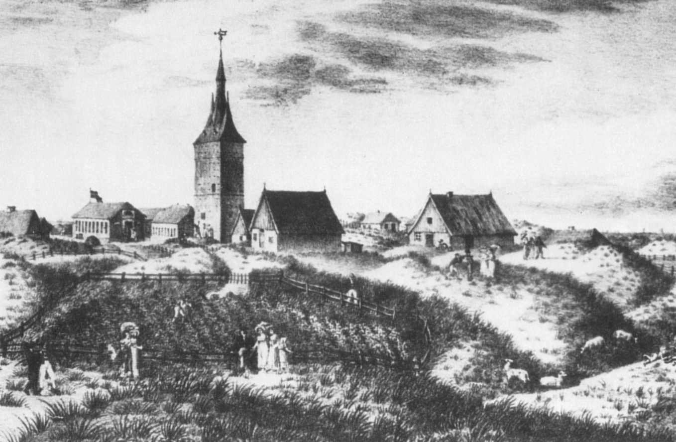 Westturm Wangerooge und altes Inseldorf